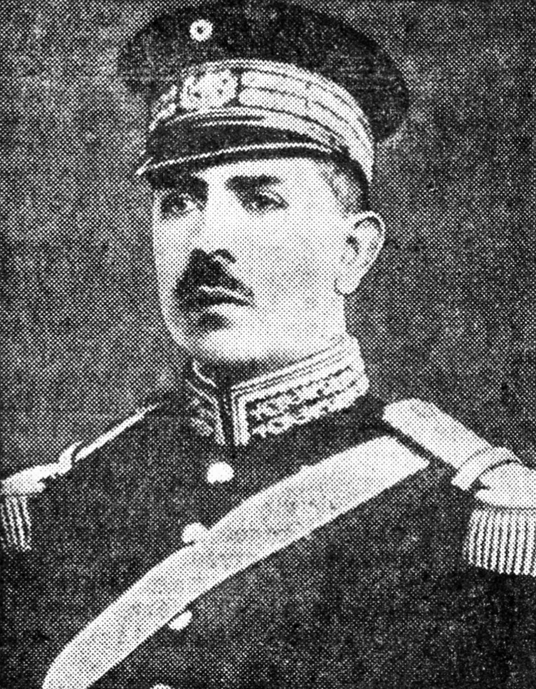 Lázaro Cárdenas, prezydent Meksyku